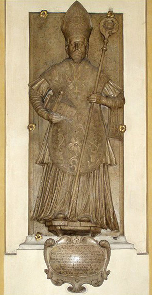 Deckplatte des Stiftergrabsteins an der Südseite der Stiftskirche